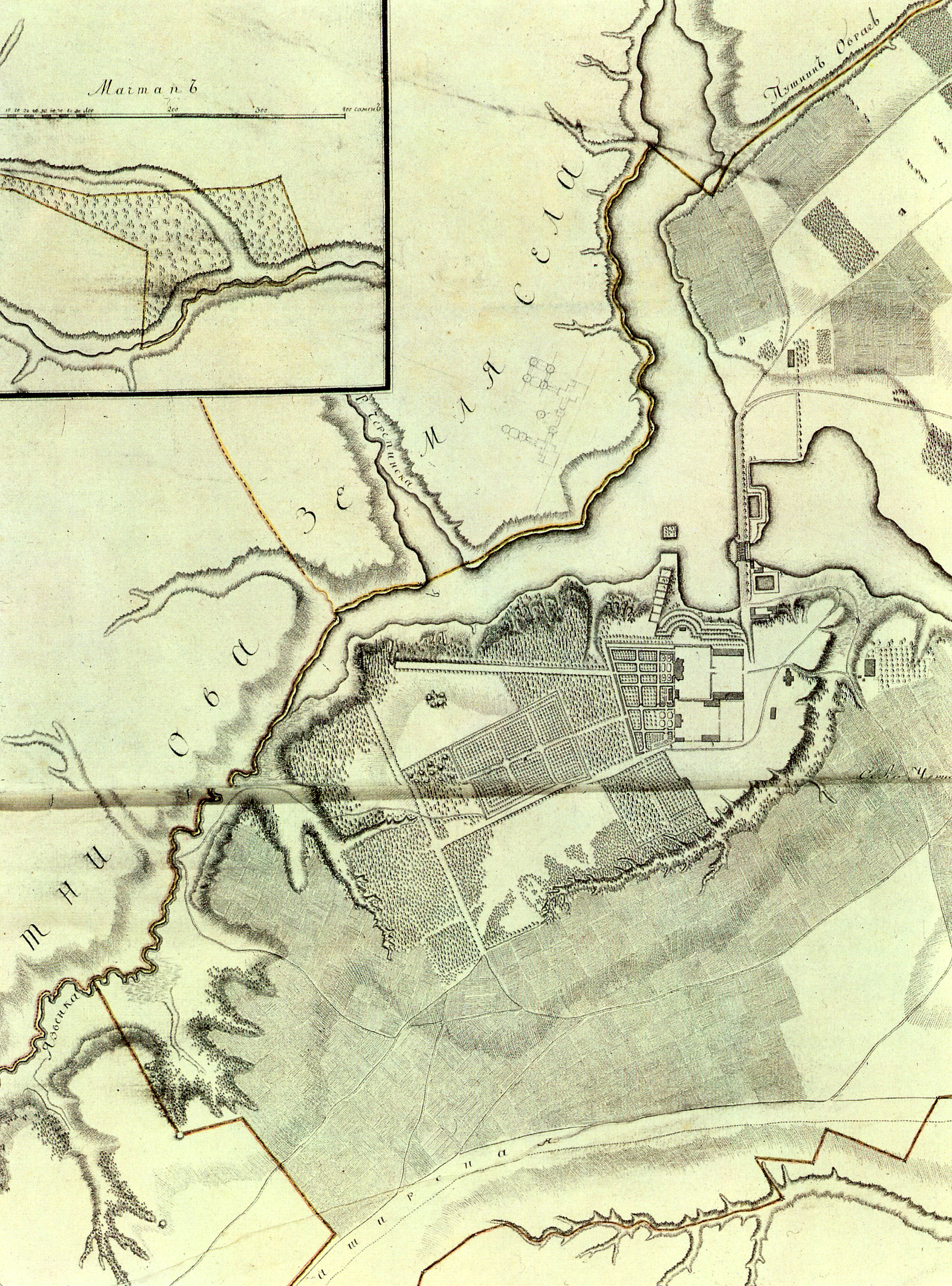 План имения Чёрная Грязь в 1775 году.